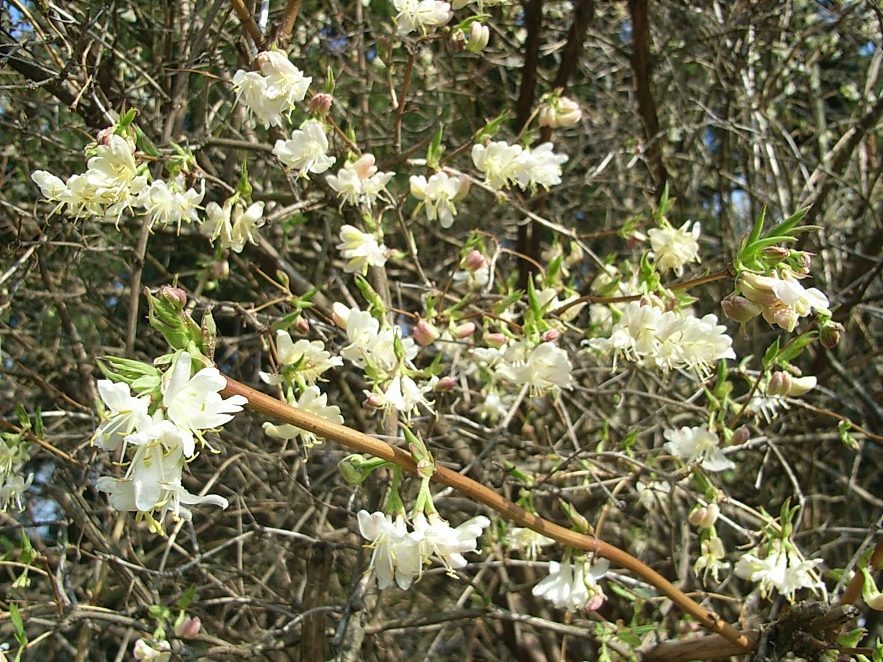 Wohlriechende Heckenkirsche